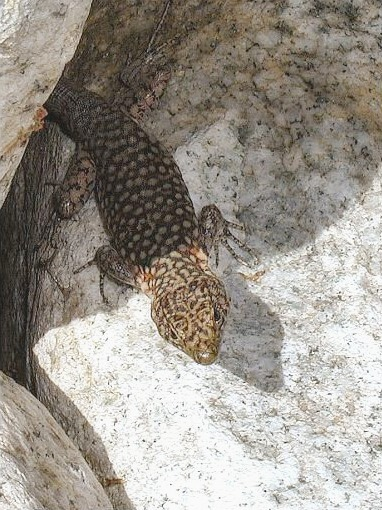 Archaeolacerta bedriagae, near Bastelica (Corsica)